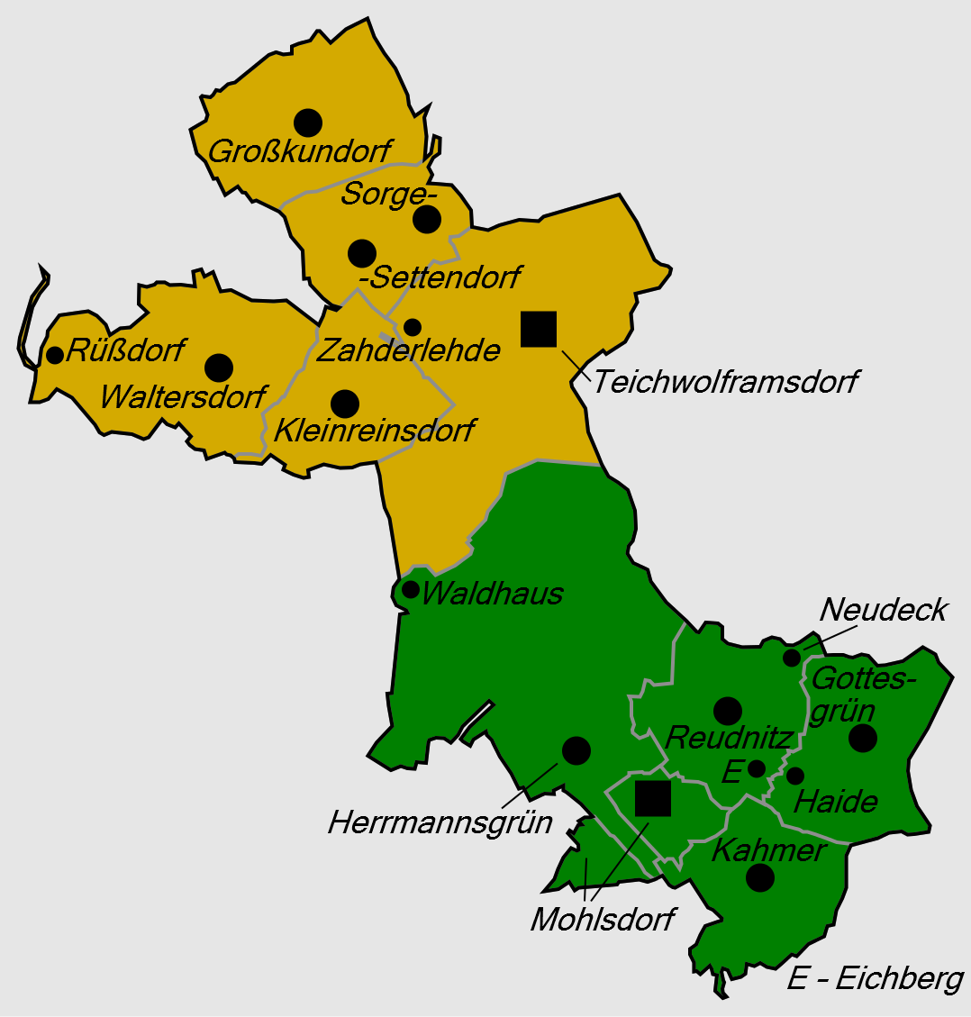 Gliederung der Gemeinde Mohlsdorf-Teichwolframsdorf ab 1. Januar 1997